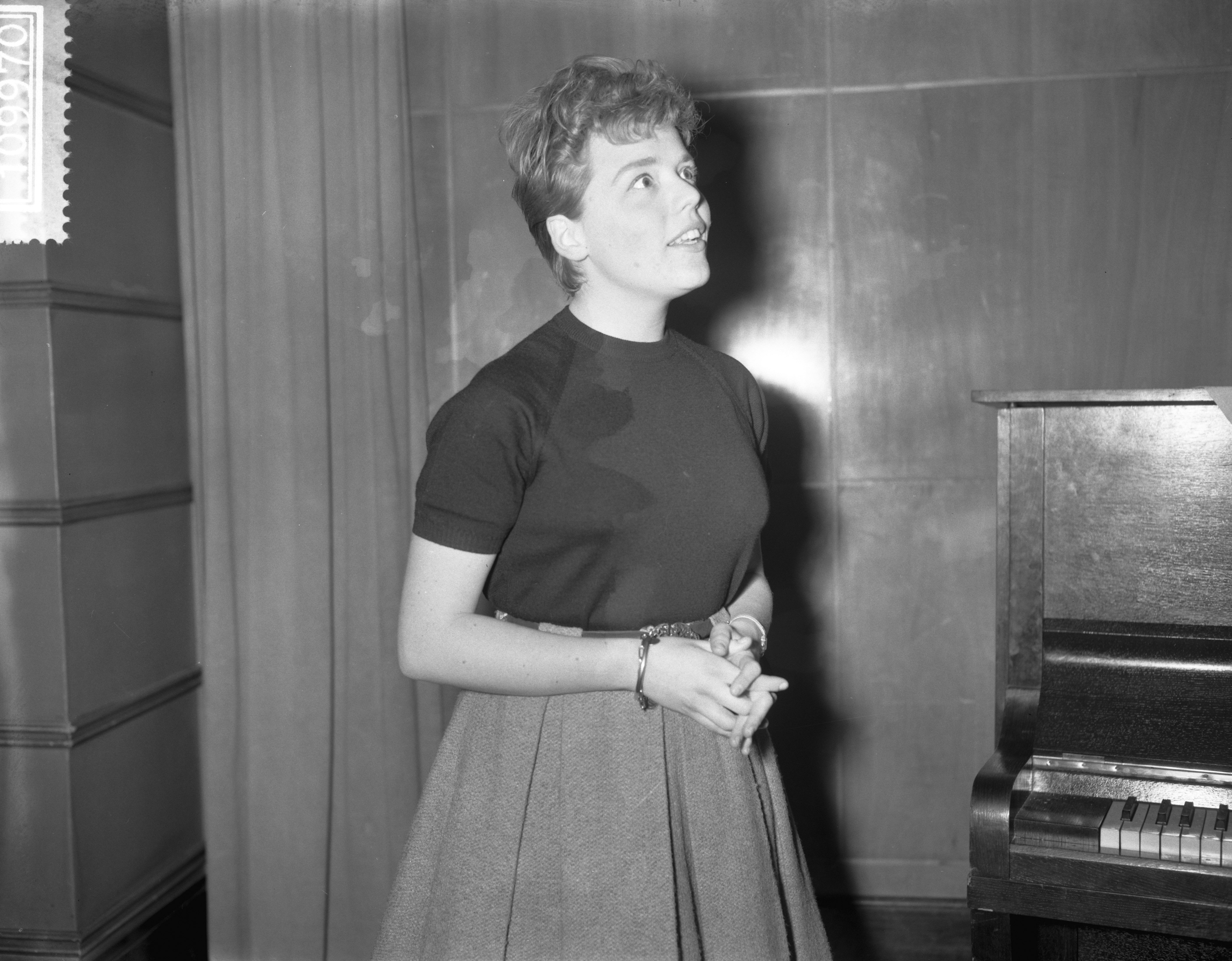 Collectie / Archief : Fotocollectie Anefo Reportage / Serie : Nationaal Songfestival 1960 Beschrijving : Repetities voor de Finale van het Nationaal Songfestival 1960 in Hilversum, Greetje Kauffeld Datum : 3 februari 1960 Locatie : Hilversum, Noord-Holland Trefwoorden : artiesten, muziek, repetities, songfestivals Persoonsnaam : Kauffeld, Greetje Fotograaf : Bilsen, Joop van / Anefo Auteursrechthebbende : Nationaal Archief Materiaalsoort : Negatief (zwart/wit) Nummer archiefinventaris : bekijk toegang 2.24.01.04 Bestanddeelnummer : 910-9970